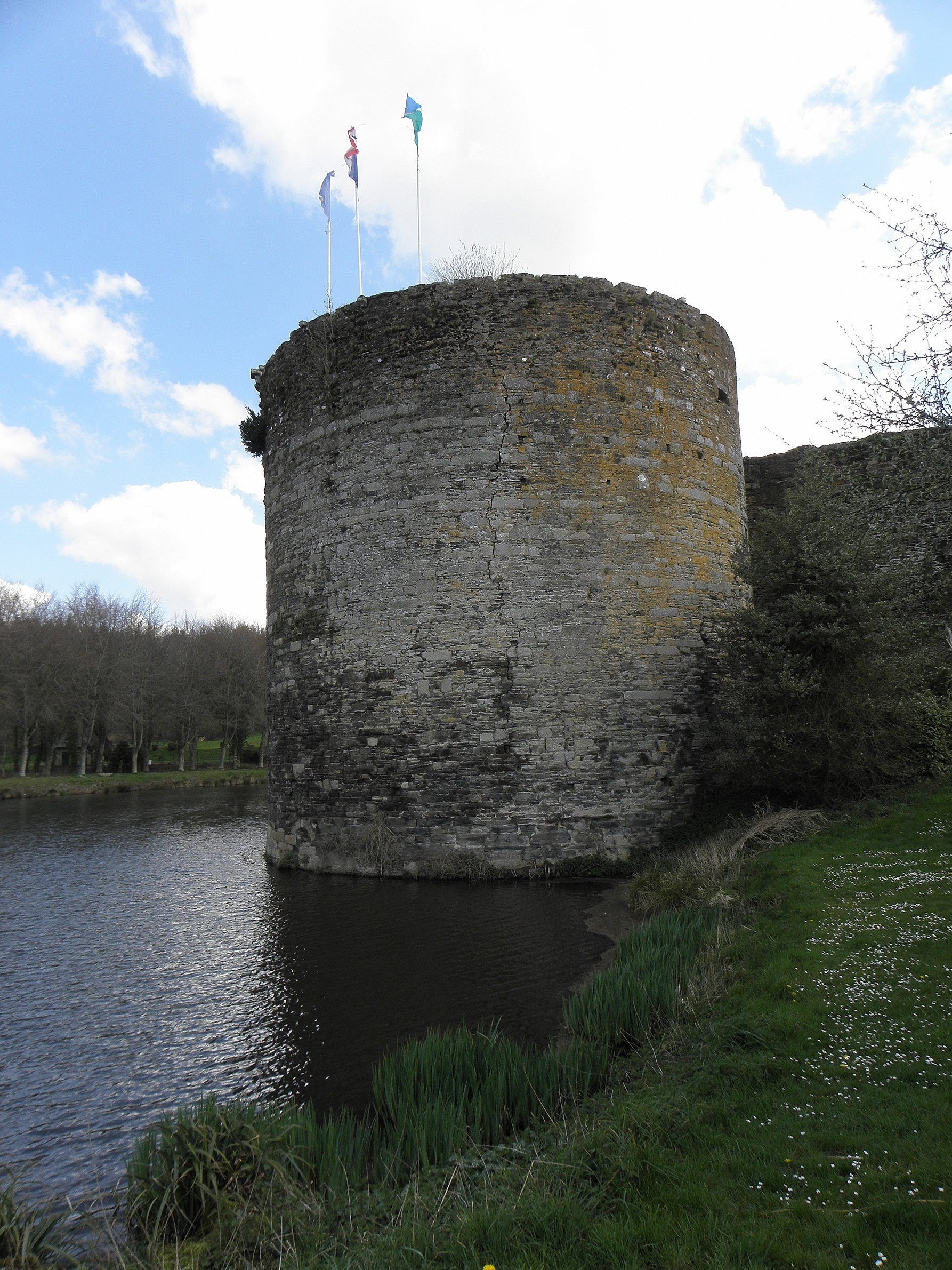 Château de Corlay (22).